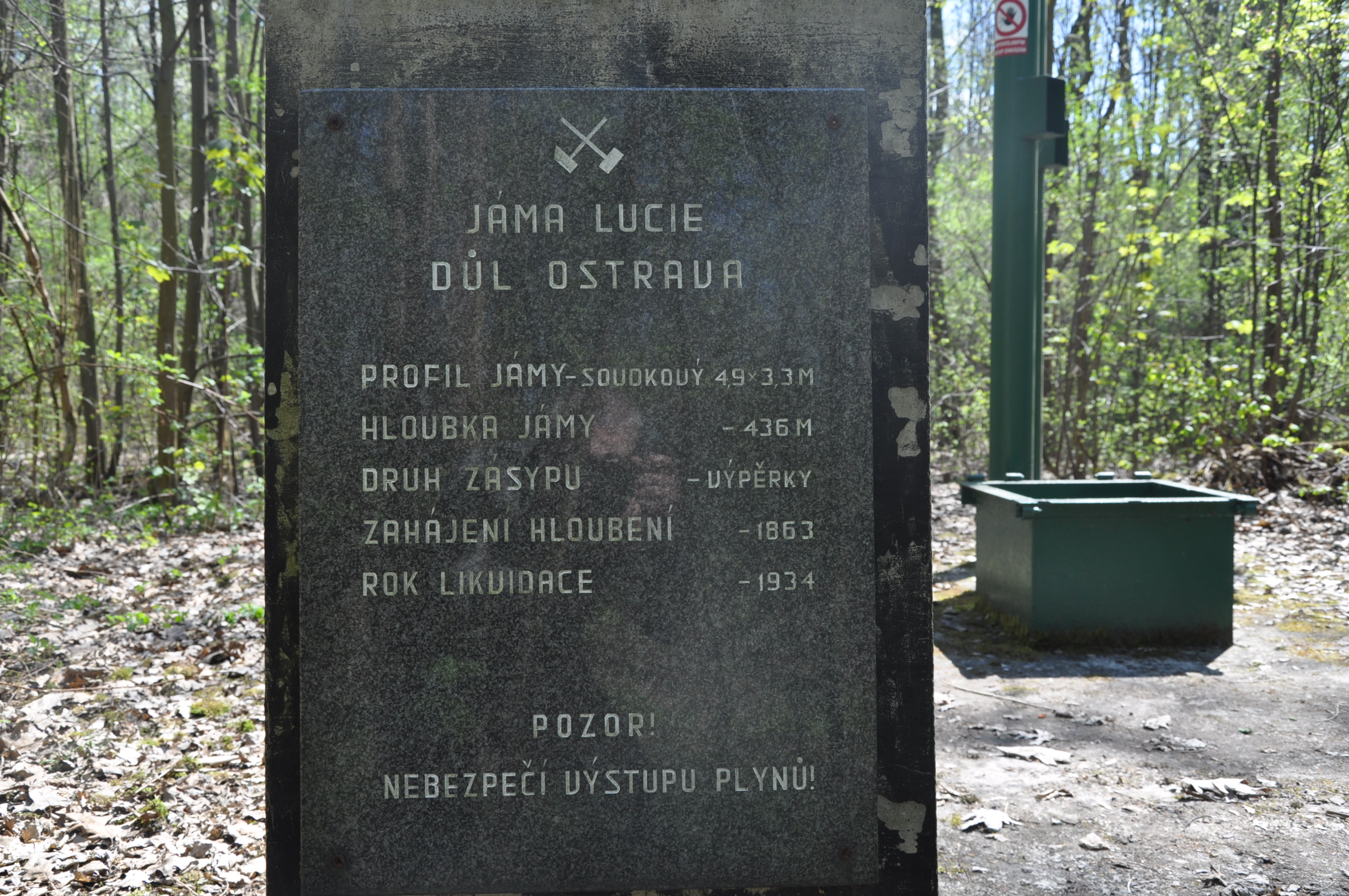 Jáma Lucie informační deska, Slezská Ostrava